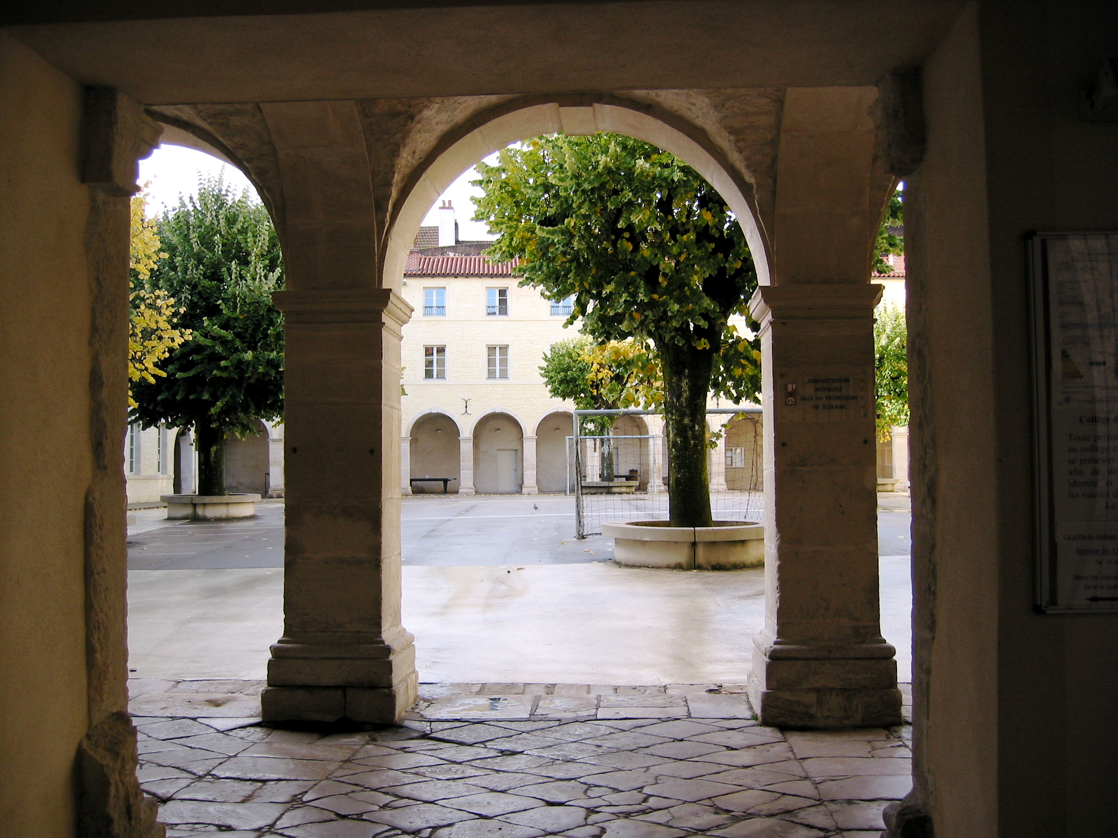 Cour principale du Collège de l'Arc à Dole 39100